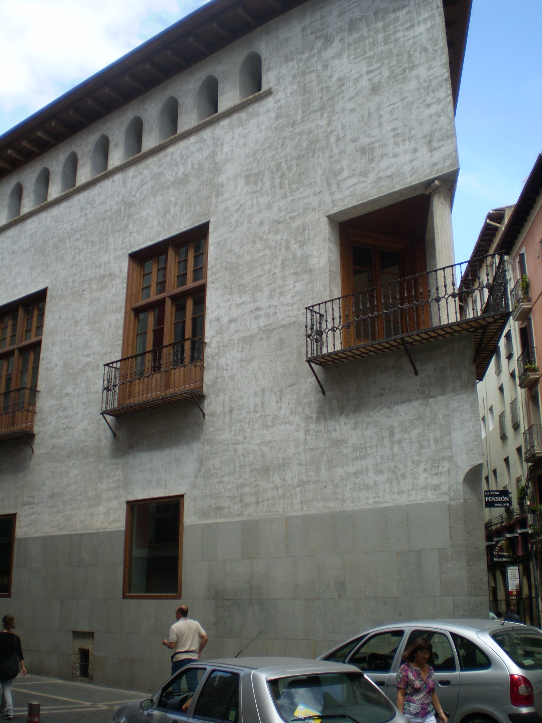 Palacio del Condestable de Pamplona (Navarra- España)